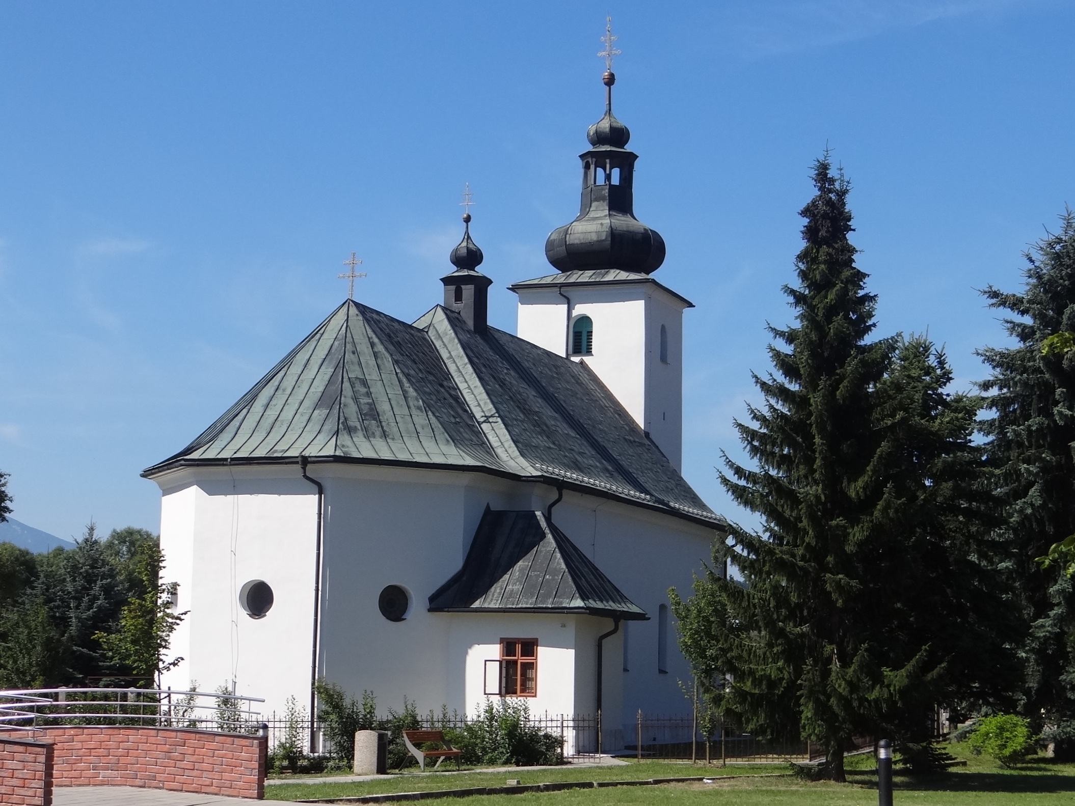 Dlhá nad Oravou, kostol